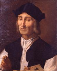 Self-portrait Marco Palmezzano